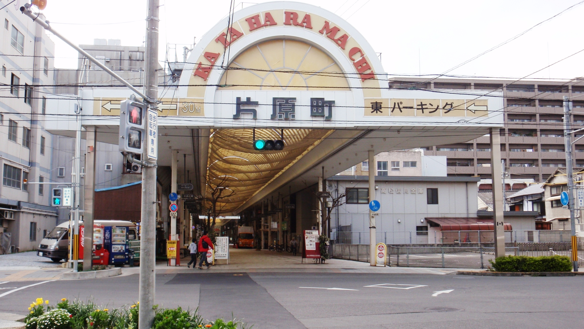 香川県高松市の片原町商店街の通町側の入り口部分。